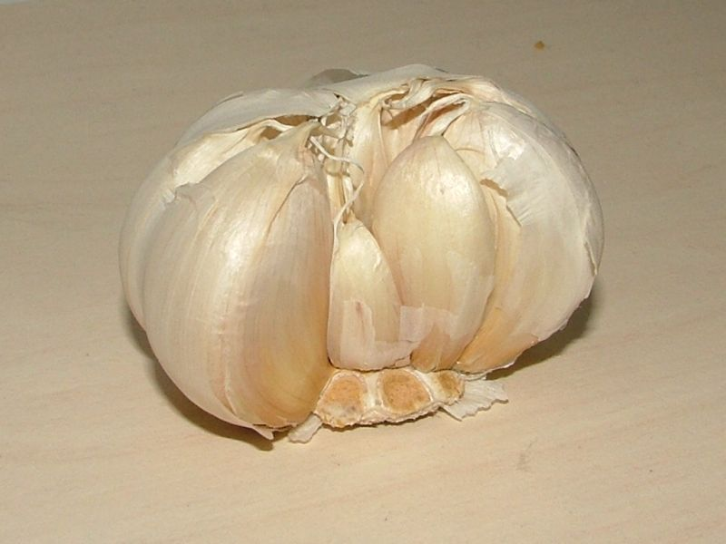 Allium sativum